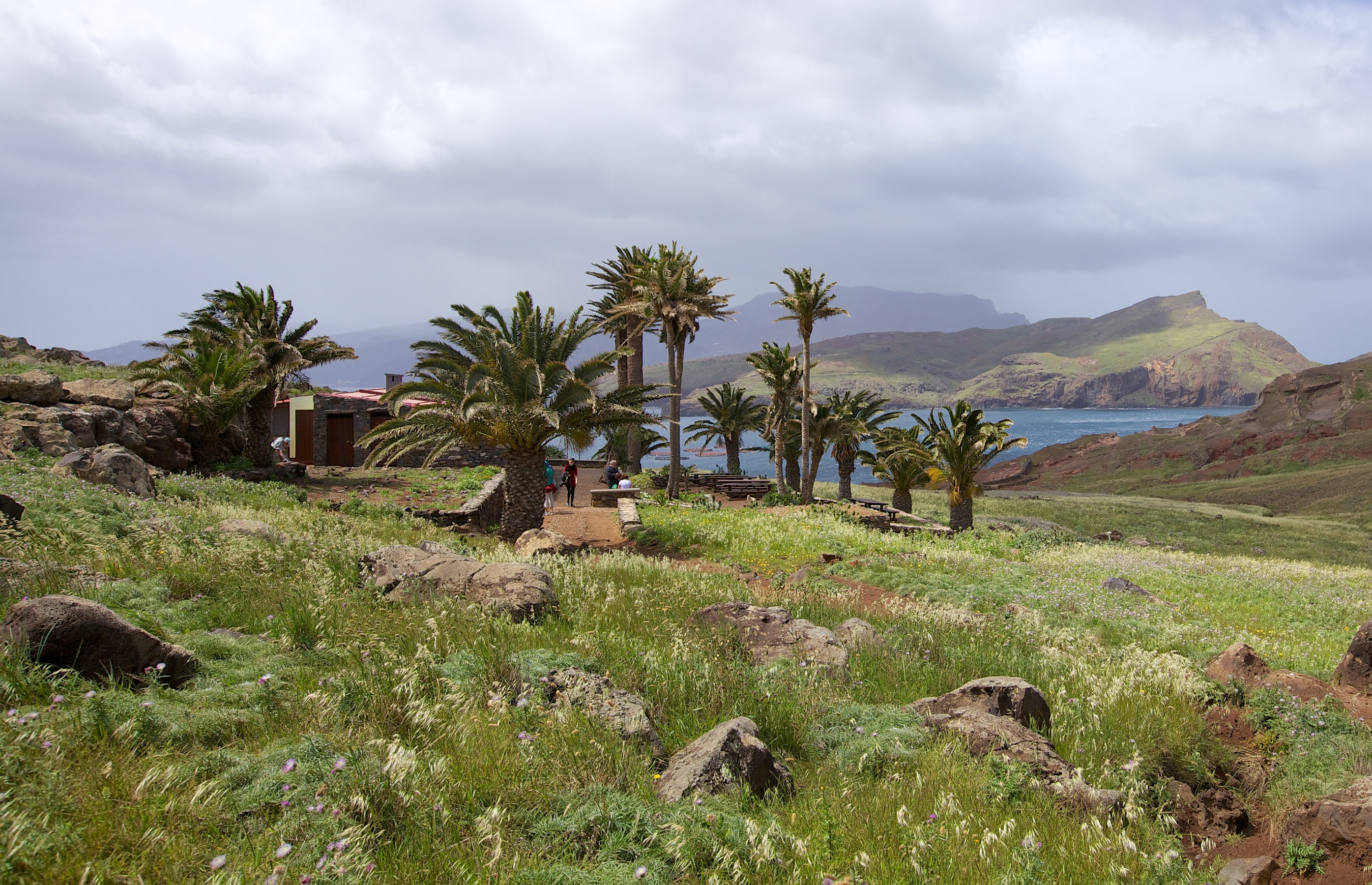 Trail to Ponta de Sao Lourenco / Madeira